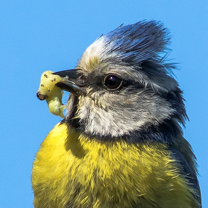 Blaumeise, Sachsen